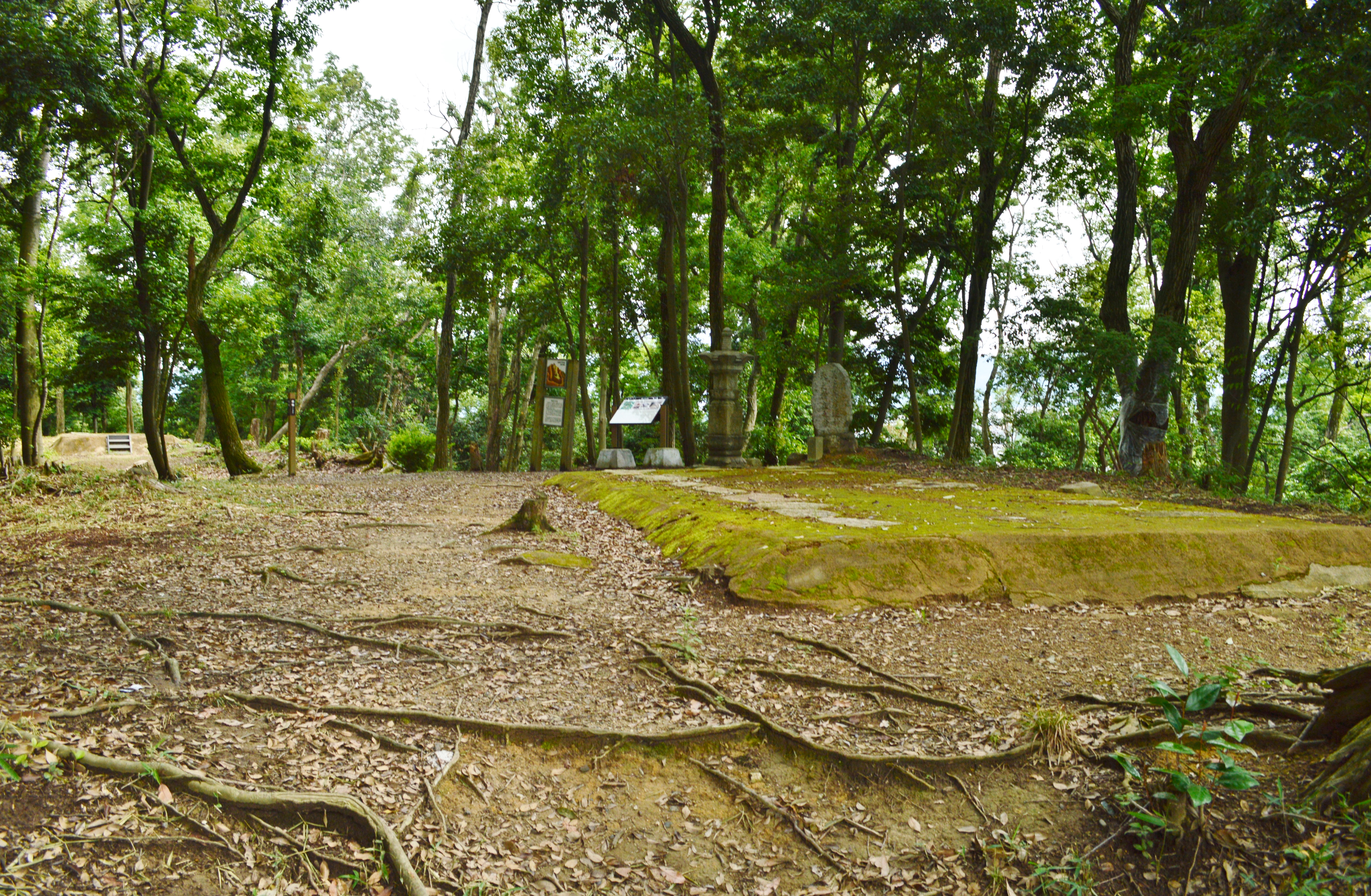 烏帽子形城 本丸 Nikon D3200